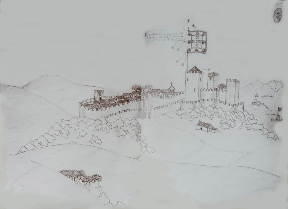 Desenho à pena sobre pergaminho, Fls. 70v. e 71 do Livro das Fortalezas. Instituto dos Arquivos Nacionais (Casa Forte, Manuscrito 159), Torre do Tombo, Lisboa, Portugal.